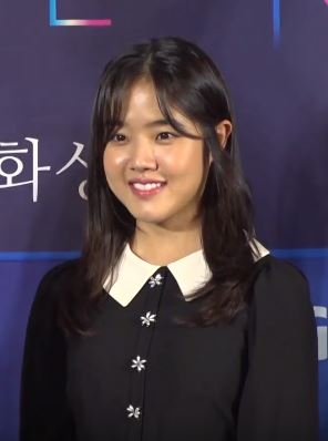 제40회 청룡영화상 핸드프린팅이 28일 오후 서울 영등포구 여의도 IFC몰 CGV에서 열렸다.